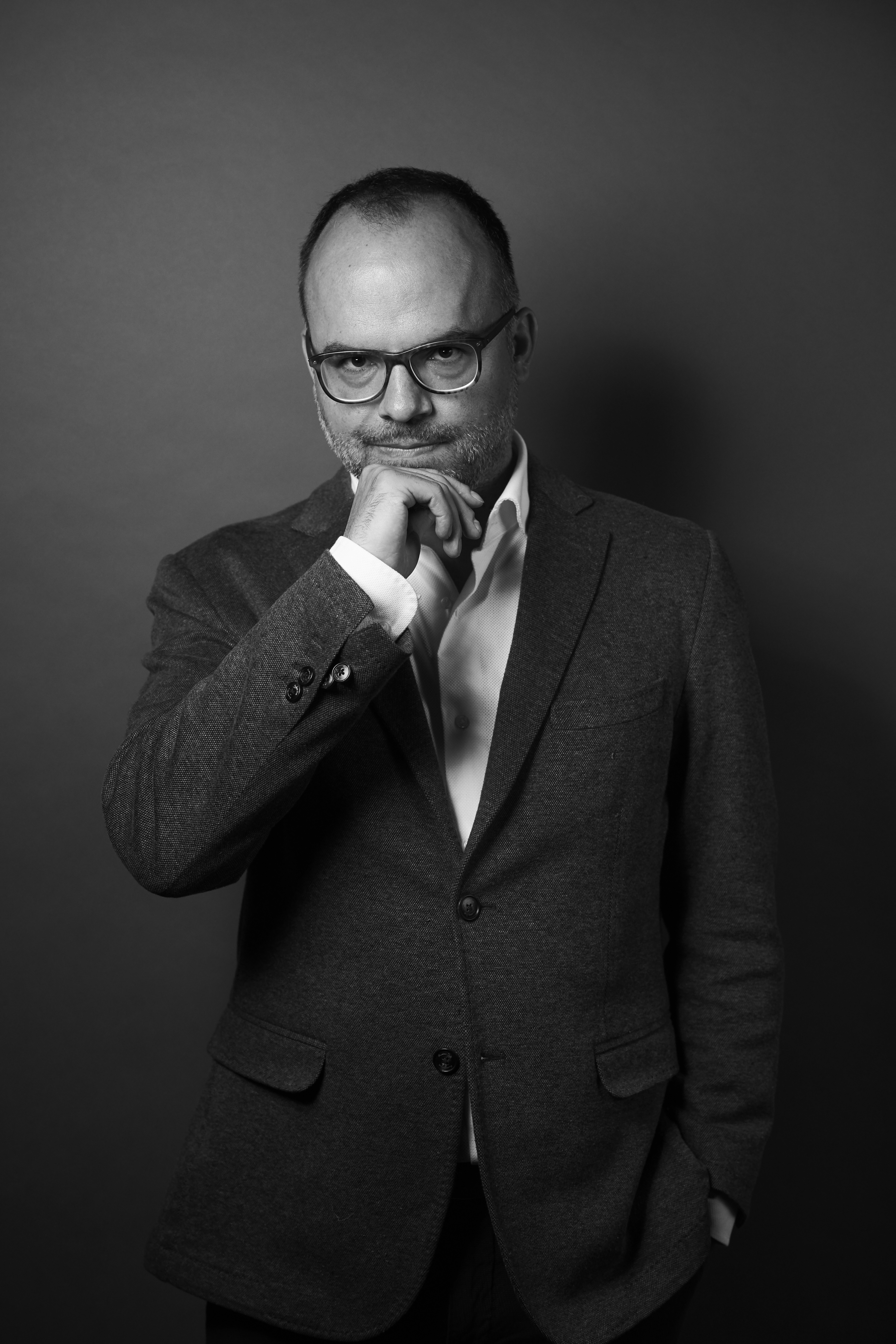 Speaker Hossein Derakhshan